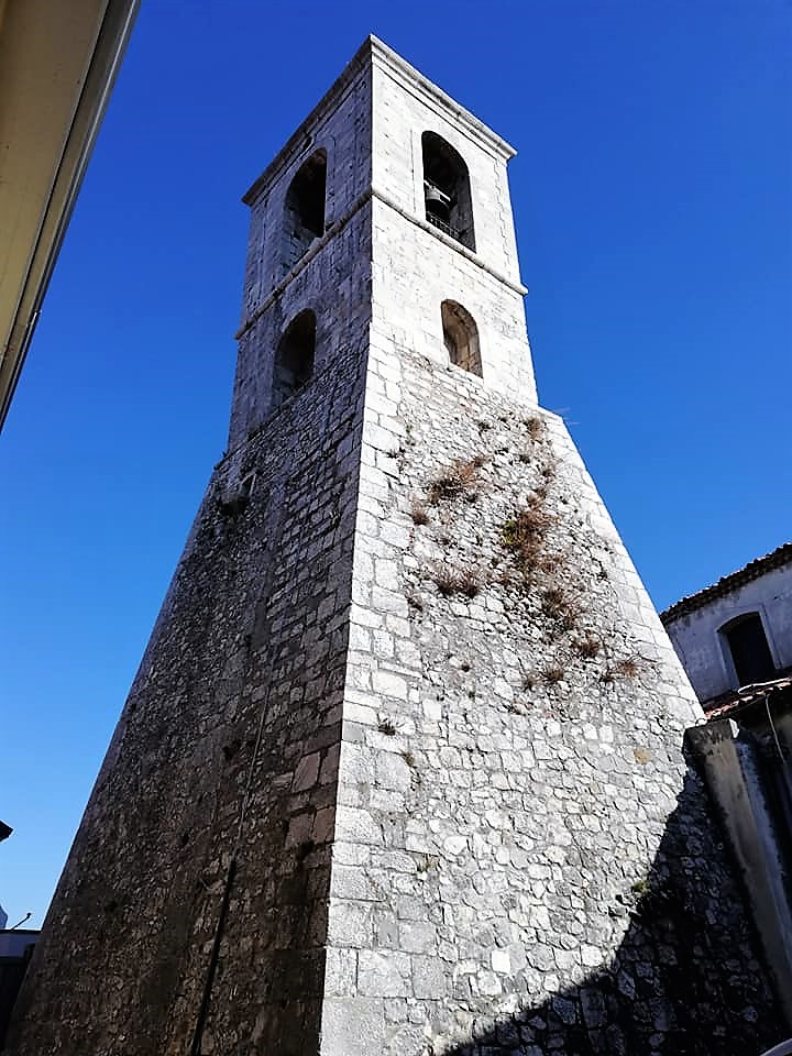 Campanile chiesa di Santa Maria Assunta.